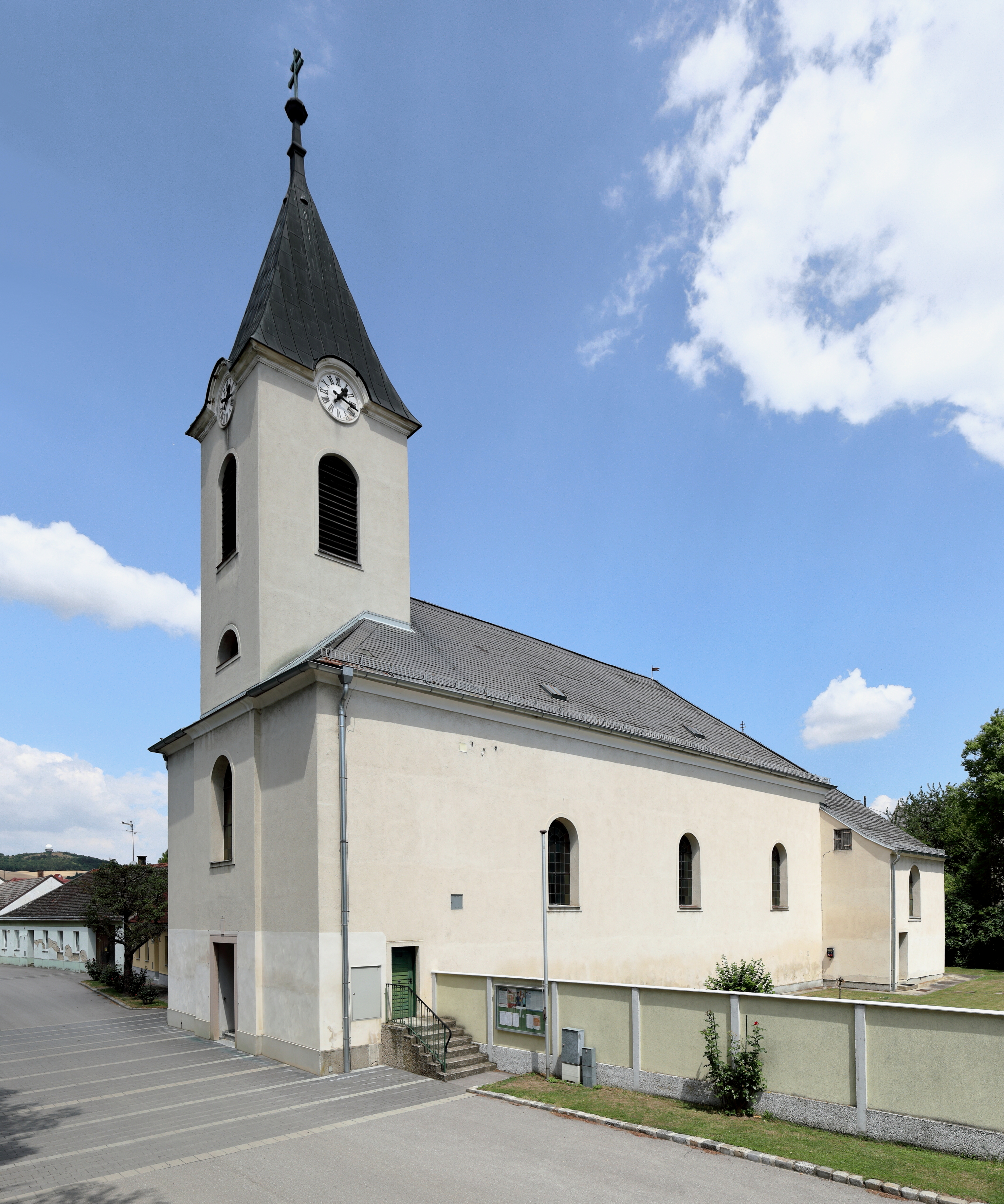 Südwestansicht der röm.-kath. Pfarrkirche Maria Himmelfahrt in der niederösterreichischen Gemeinde Niederleis. Die schlichte Saalkirche wurde anstelle der abgebrannten gotischen Pfarrkirche "Maria im Felde" errichtet und 1814 geweiht.